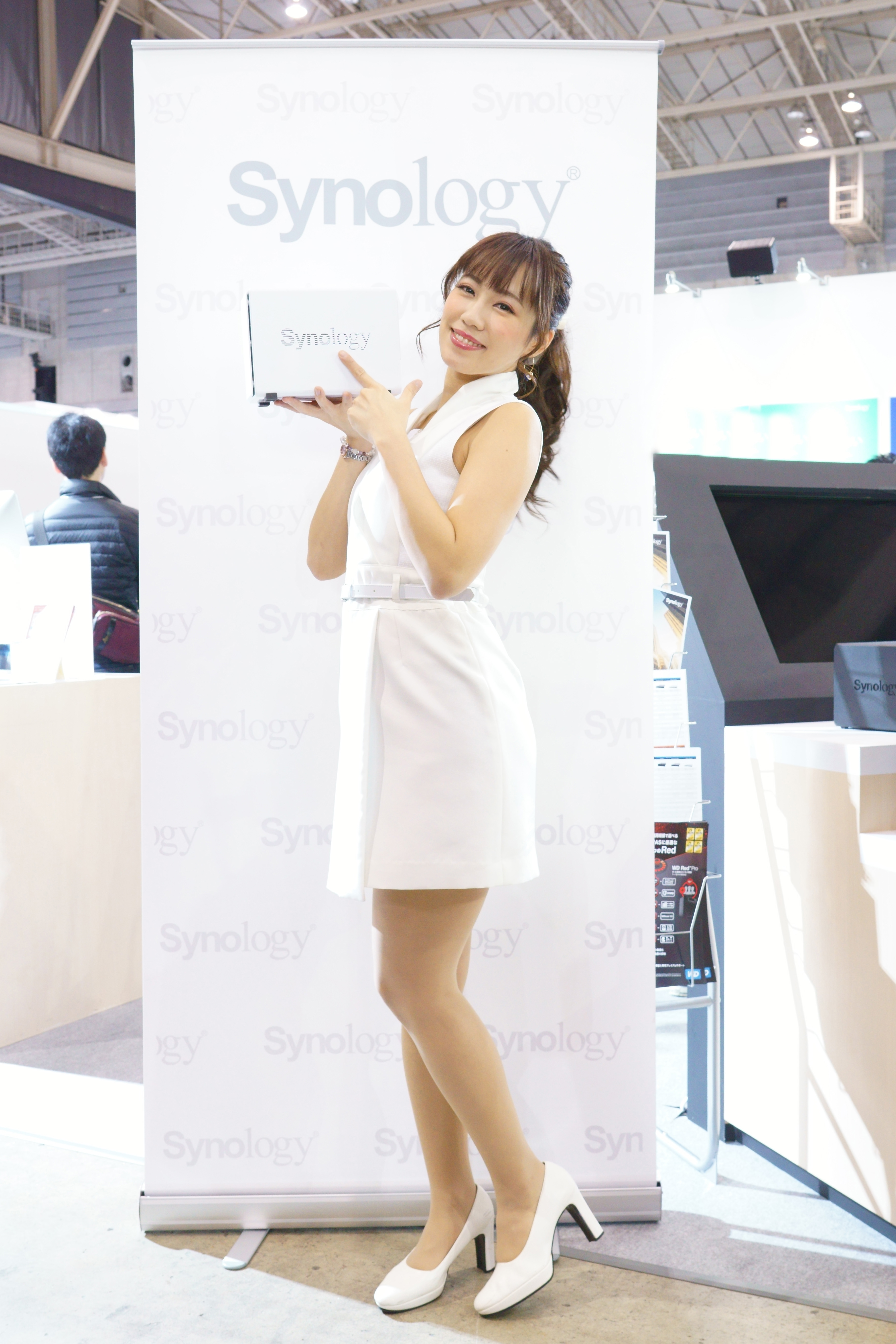 Seiko Kirishima